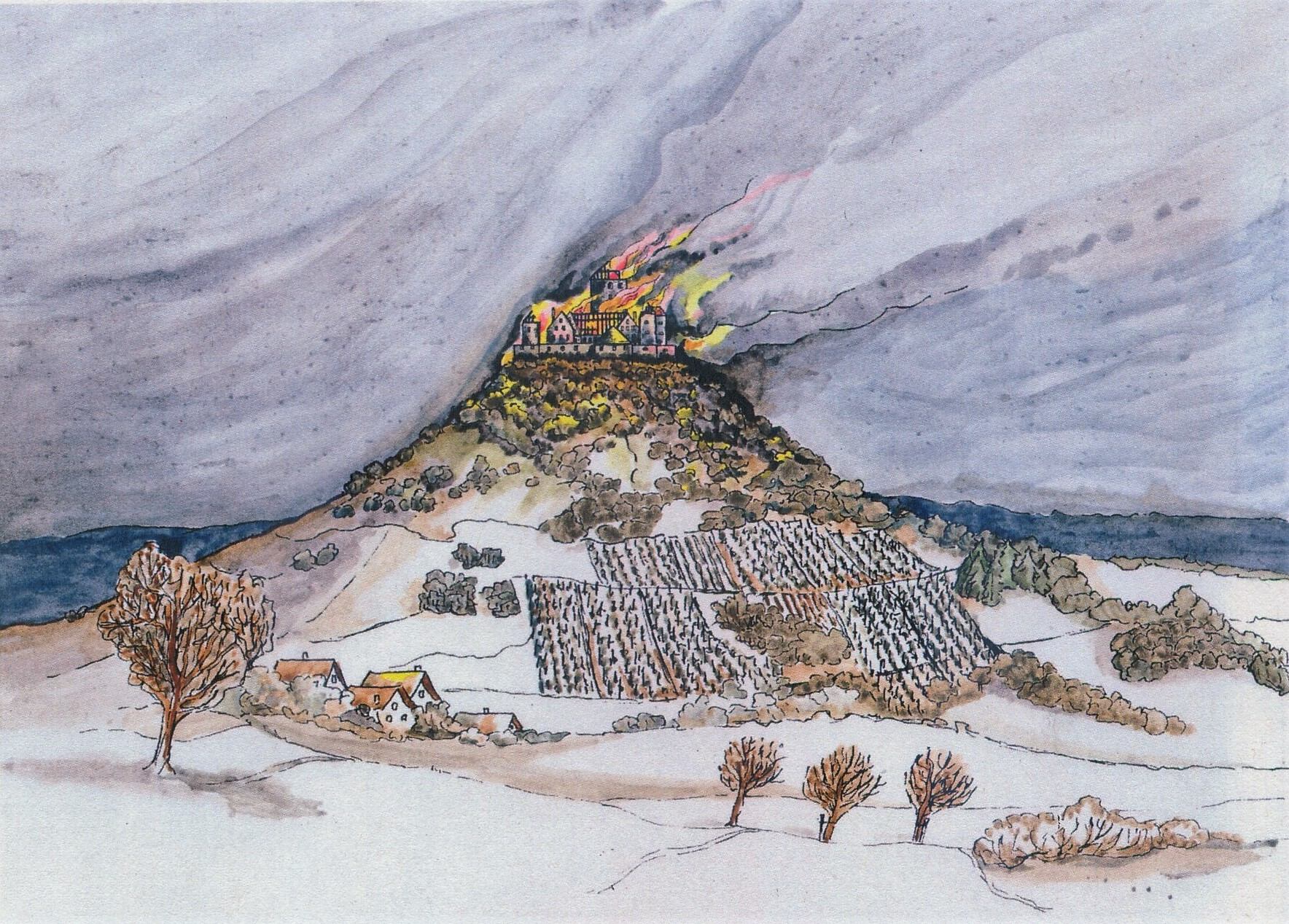 Küssaburg im Landkreis Waldshut in Baden-Württemberg. Historische Darstellung des Brands der Burg 1634. Zeichnung von Wolf Pabst.